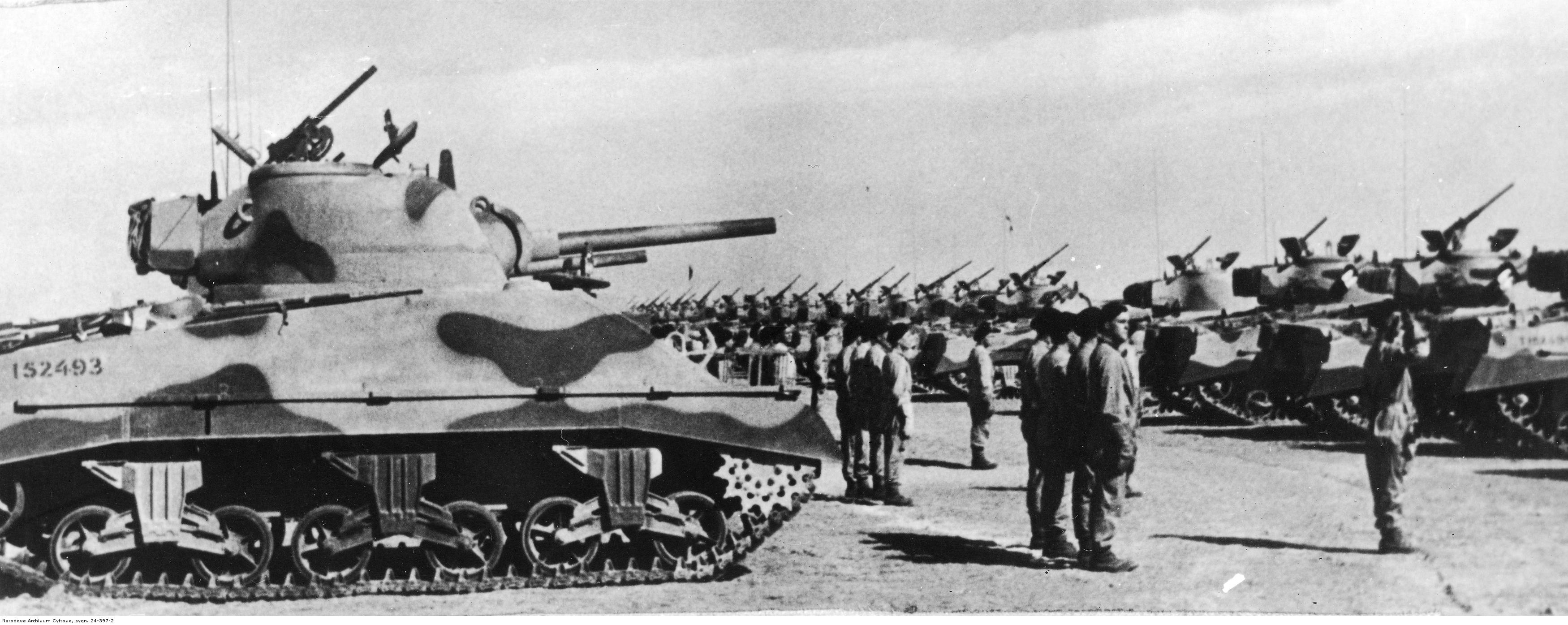 Wizyta generała Kazimierza Sosnkowskiego w Samodzielnej 2 Brygadzie Pancernej w Palestynie. Zbiórka pododdziałów brygady. Widoczne czołgi M4 Sherman. Archiwum Fotograficzne Tadeusza Szumańskiego. Sygnatura: 24-397-2